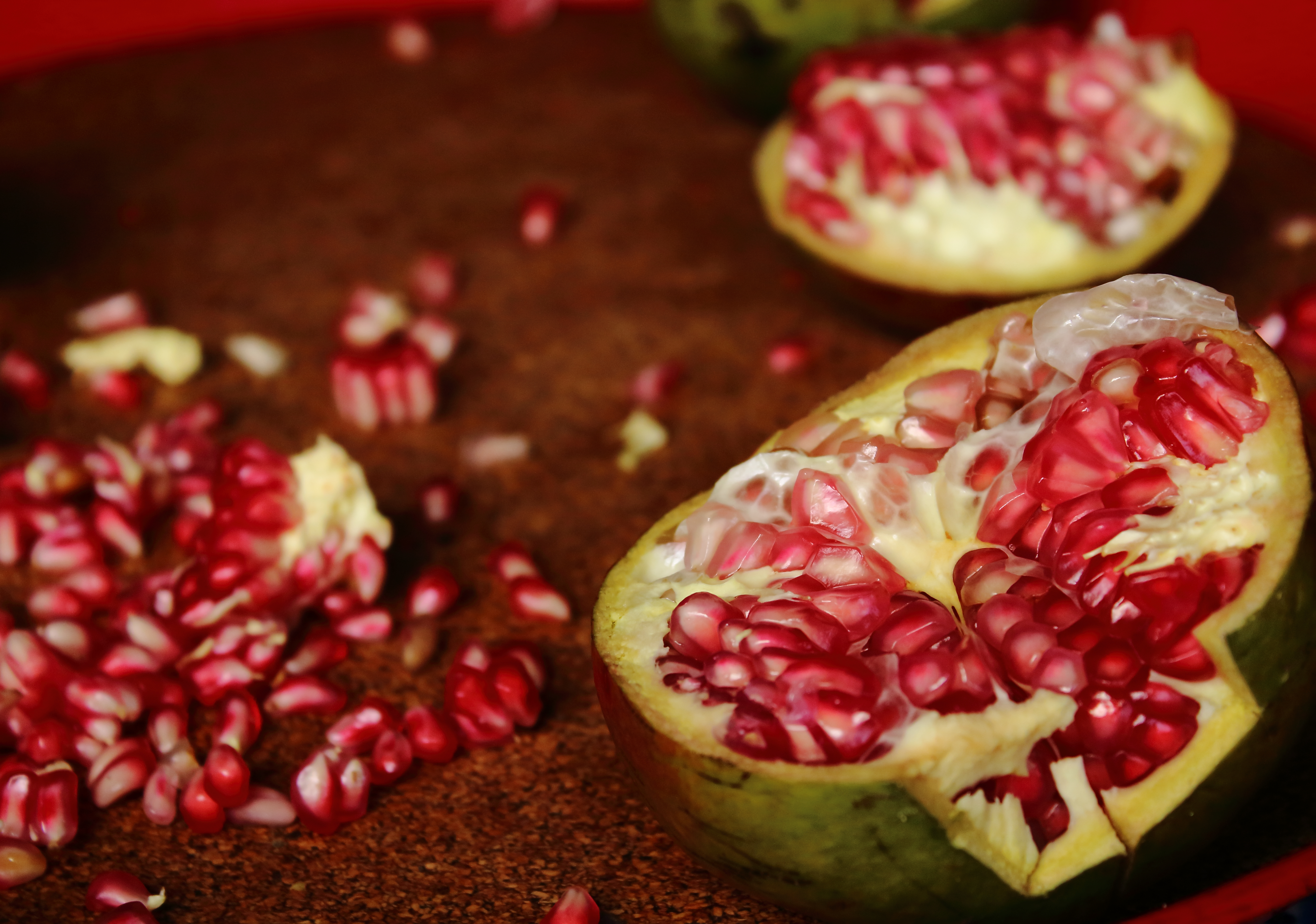 Punica granatum, o bien, una granada abierta.